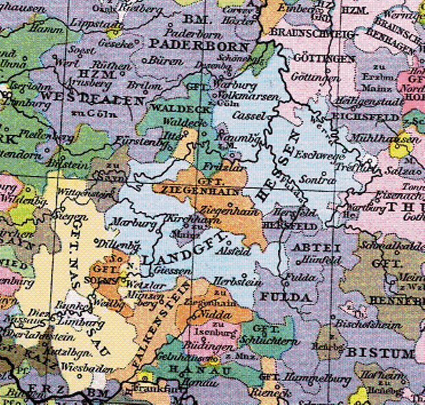 Grafschaft Solms (orange, links), Landgrafschaft Hessen (hellblau, Mitte) und Grafschaft Ziegenhain (orange) um 1400